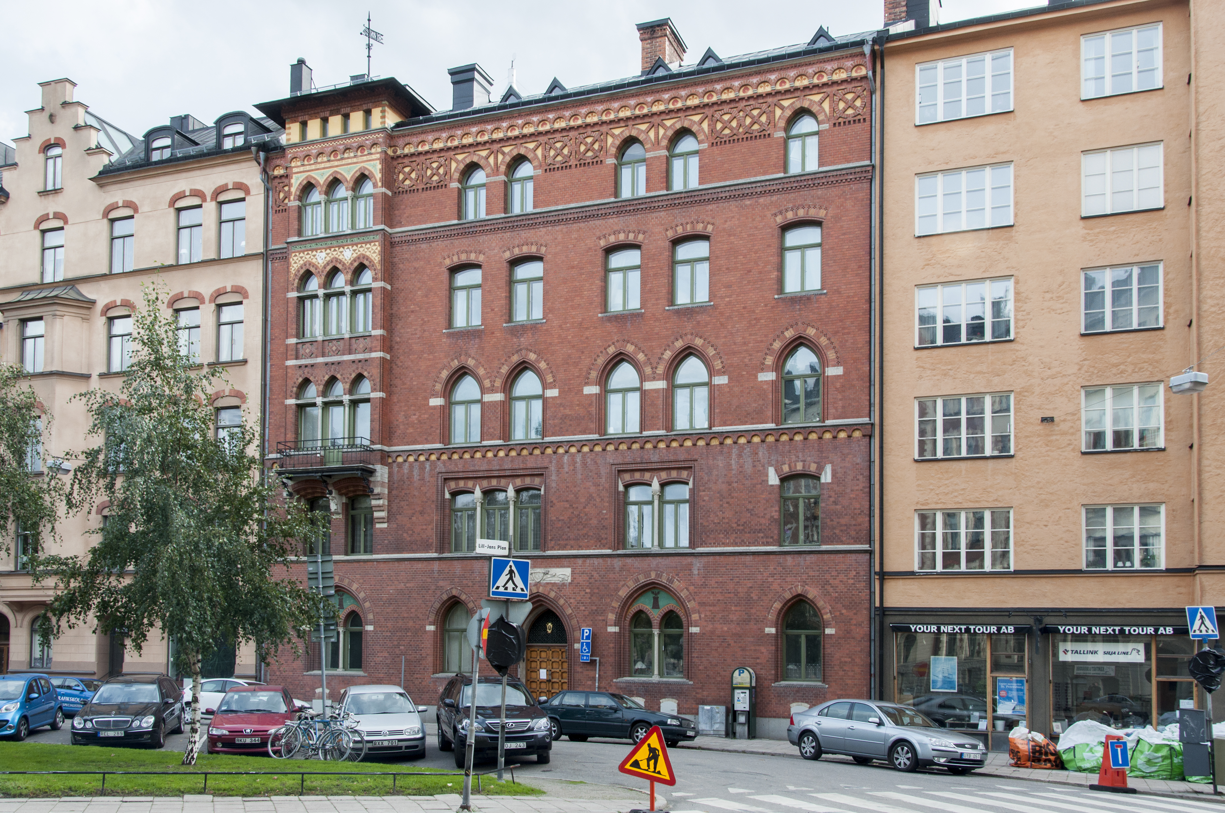 Whitlockska huset. Tallen 21, Lill-Jans Plan 4. Byggnadsår 1887-88, arkitekt Gustaf Lindgren, byggherre Sophie Whitlock, byggmästare J Nilsson.